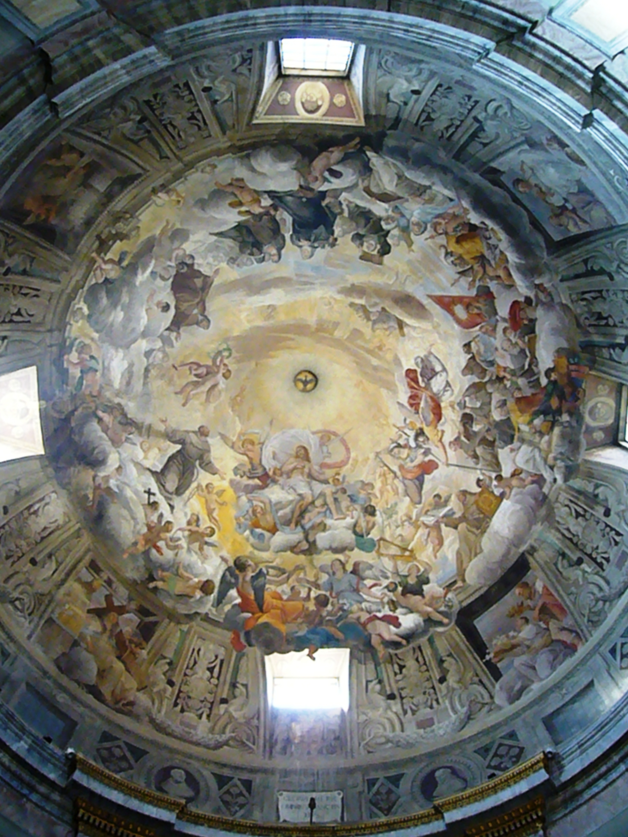 Roma, san Bernardino in Panisperna, cupola: Bernardino Gagliardi, Gloria di san Bernardino